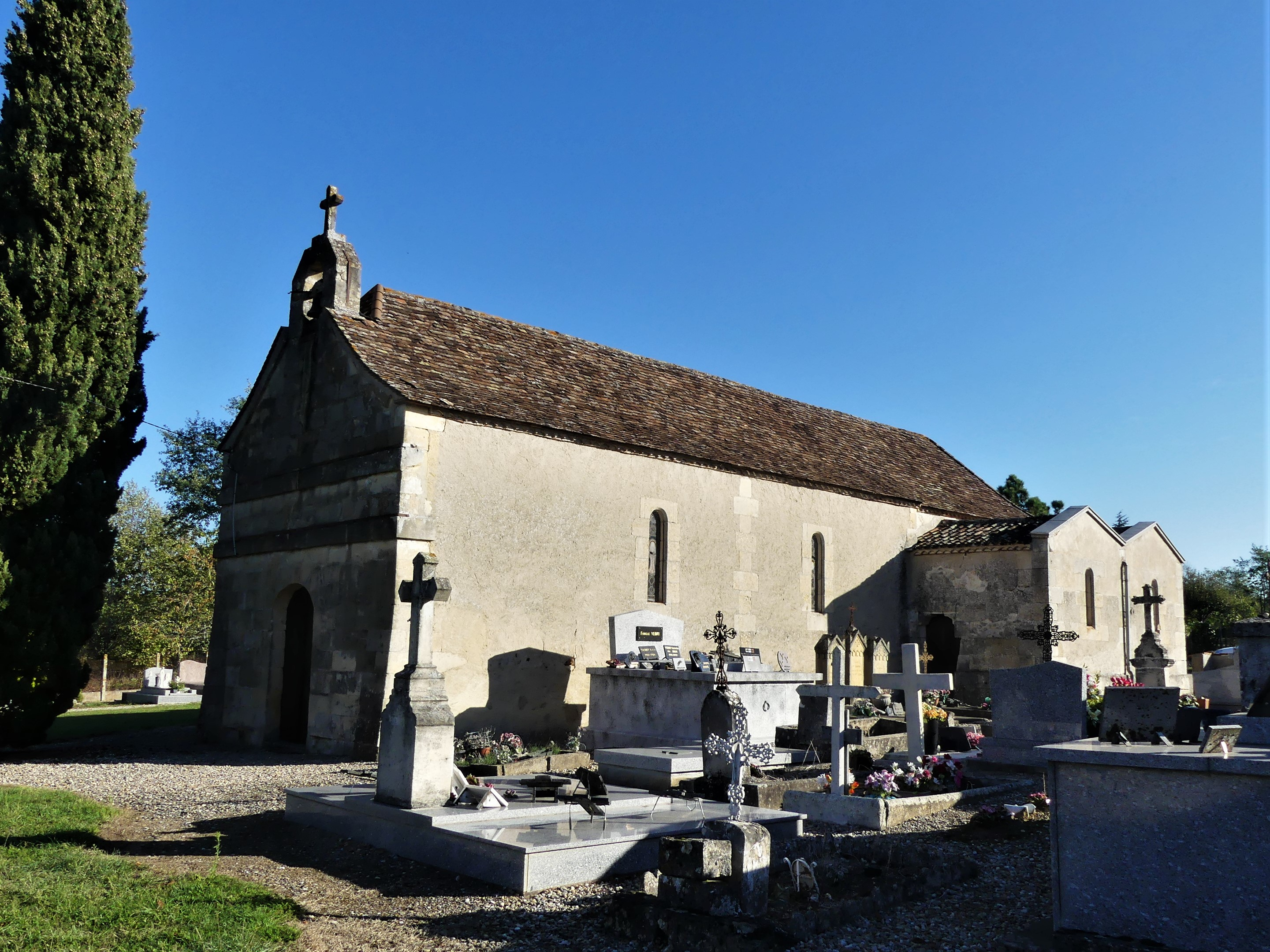 L'église de Sainte-Foy-des-Vignes, Ginestet, Dordogne, France.